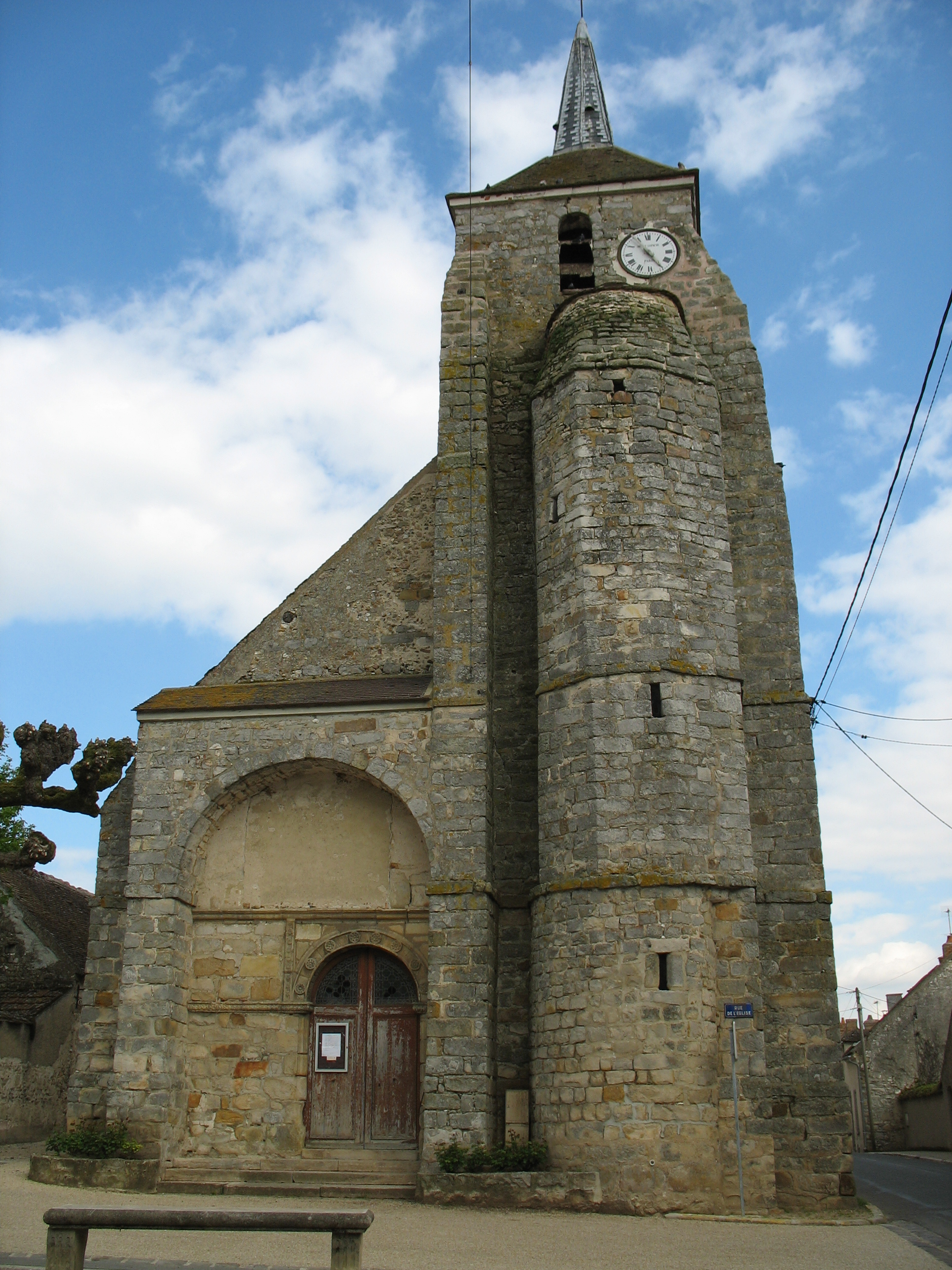 église Saint-Martin à Misy sur Yonne (77)